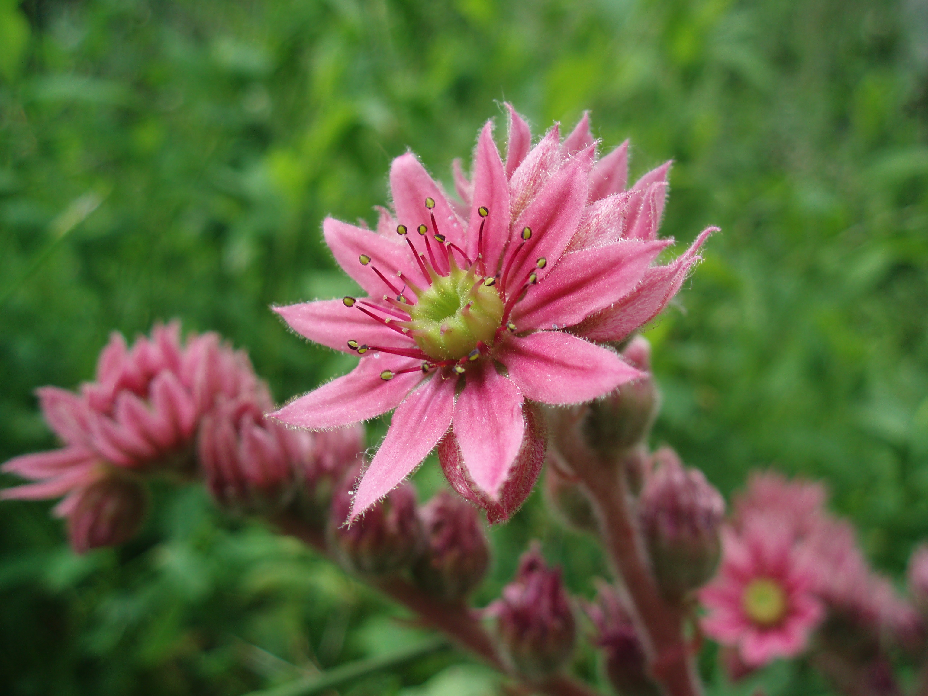 Bloeiende huislook.